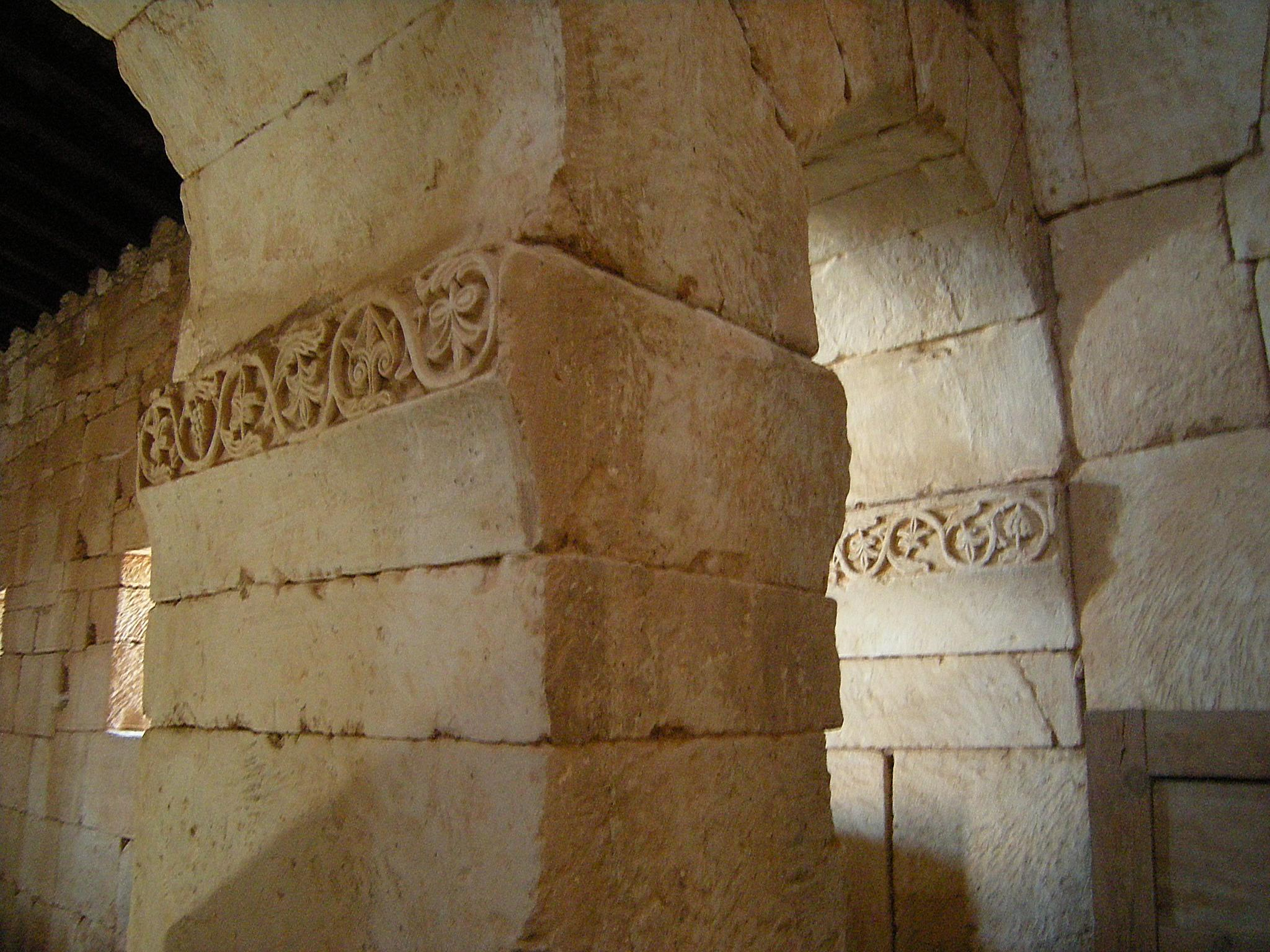 Iglesia de San Pedro de la Nave